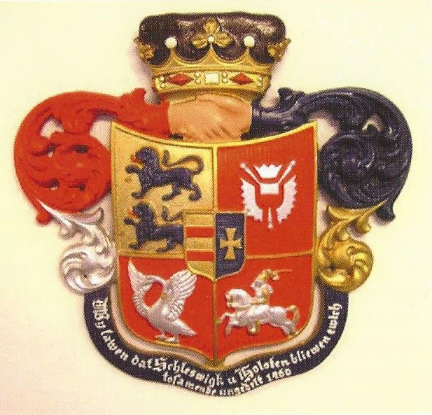 In der Rendsburger Carlshütte wurde im März 1844 erstmalig ein solches gusseisernes Wappen hergestellt. Die Hände betonen, was das Motto aussagt: „Wy lawen dat Schleswigk u[nde] Holsten blieven ewich tosamende ungedelt 1460.“ Damit wird der Ripener Schwur (Up ewig ungedeelt) von Christian I. (Dänemark, Norwegen und Schweden) wieder aufgegriffen. Als Hausschmuck konnte das Wappen aber erst poulär werden, nachdem Schleswig-Holstein preußisch geworden war. Besonders 1898 zum 50. Jahrestag der Schleswig-Holsteinischen Erhebung wurden solche gusseiserne Wappen aus der Carlshütte aufgehängt. Sie bezeugten die schleswig-holsteinische Identität und Tradition. Das quadrierte Wappen besteht aus vier Einzelwappen (Schleswig, Holstein, Dithmarschen und Stormarn). Im Herzschild ein „gespaltenes Wappen“: Der rote Balken auf goldenem Grund steht für die Grafschaft Oldenburg, das goldene Kreuz auf blauem Grund für die Grafschaft Delmenhorst – ein Verweis auf die Herkunft des ehemaligen Landesherrn.